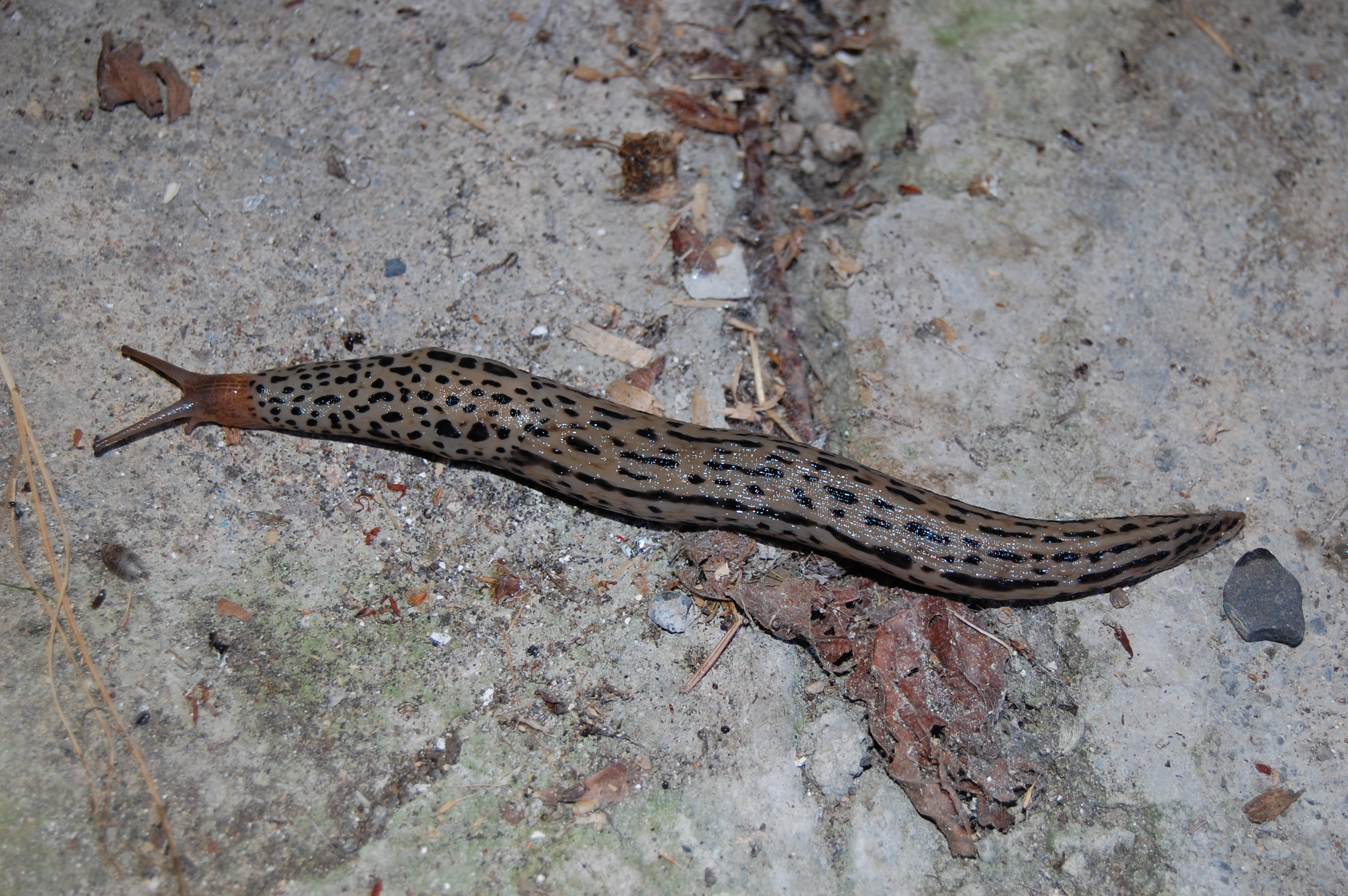 Limax maximus in Switzerland